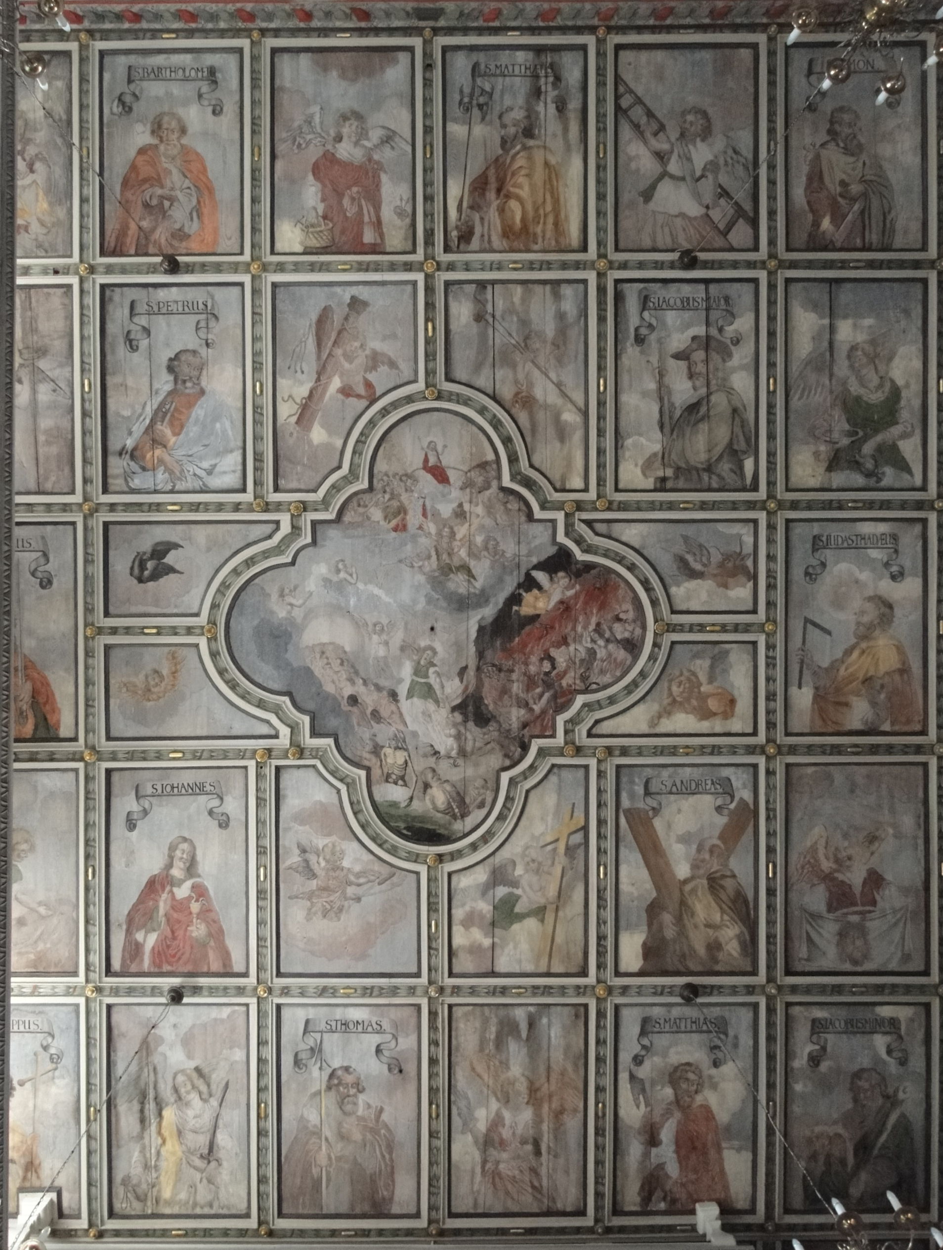 Felderdecke Kirche Leubnitz-Neuostra